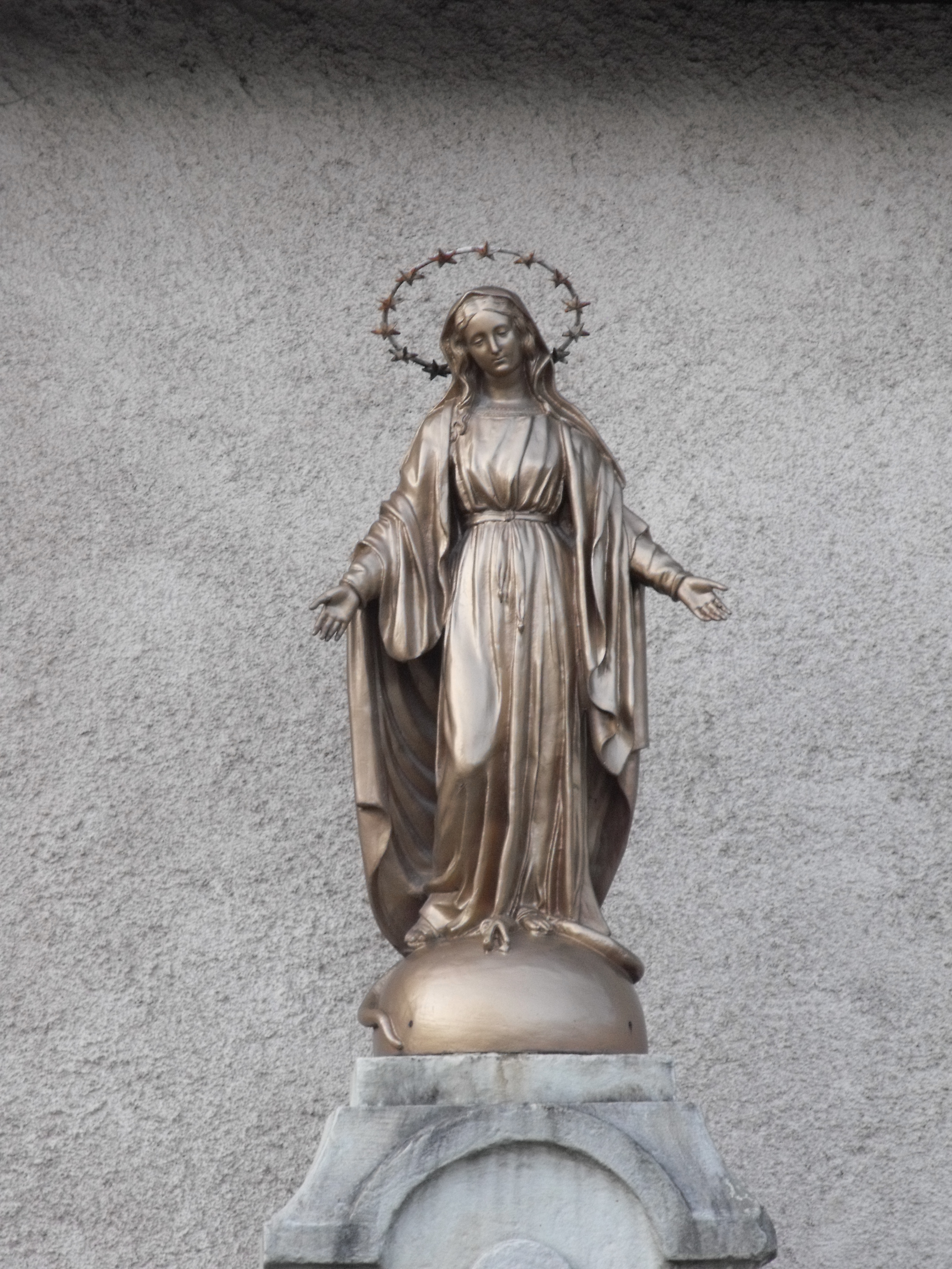 Statue de la Vierge, Villars Sous Dampjoux, Doubs, France